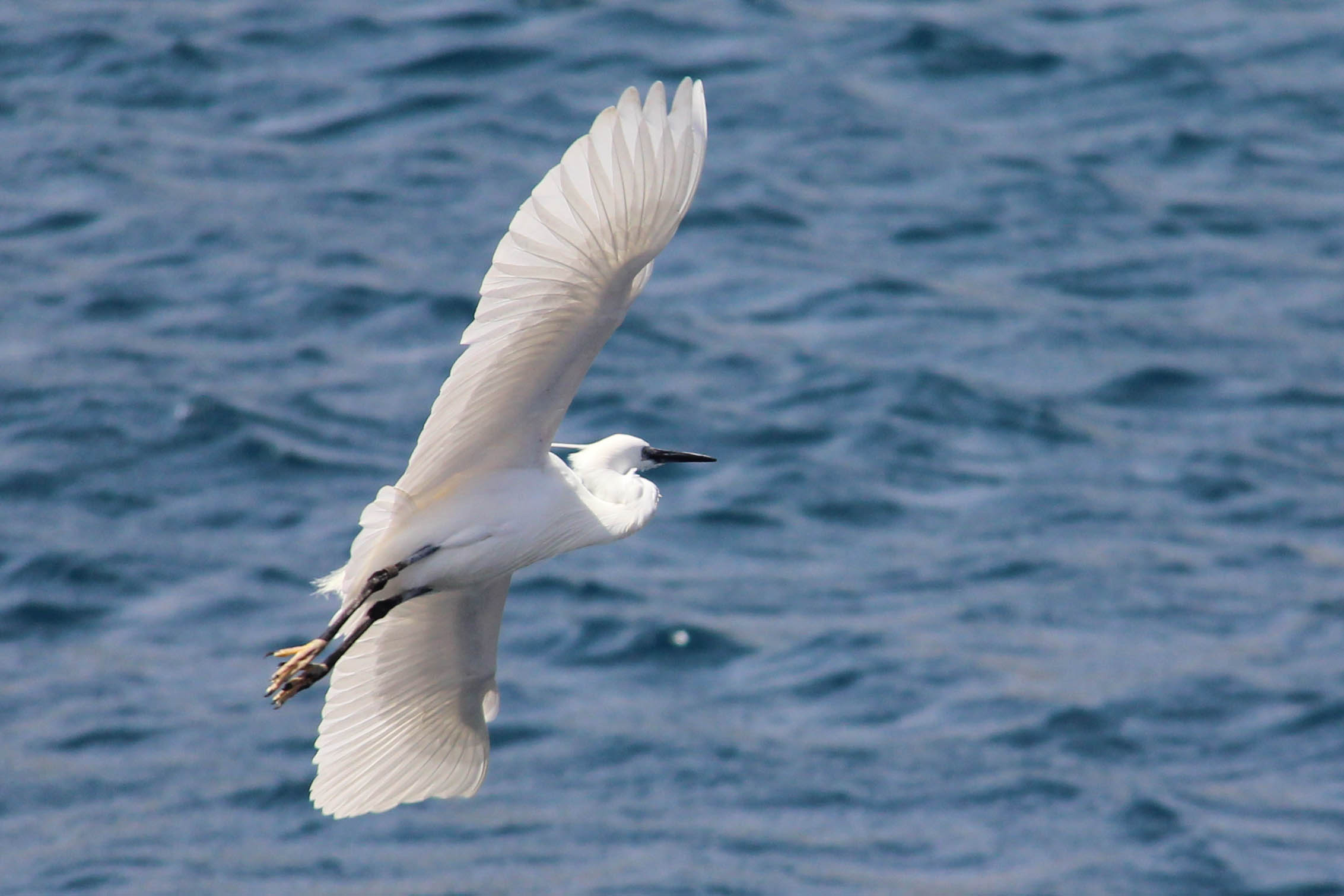 بلشون أبيض صغير - خليج إيلات